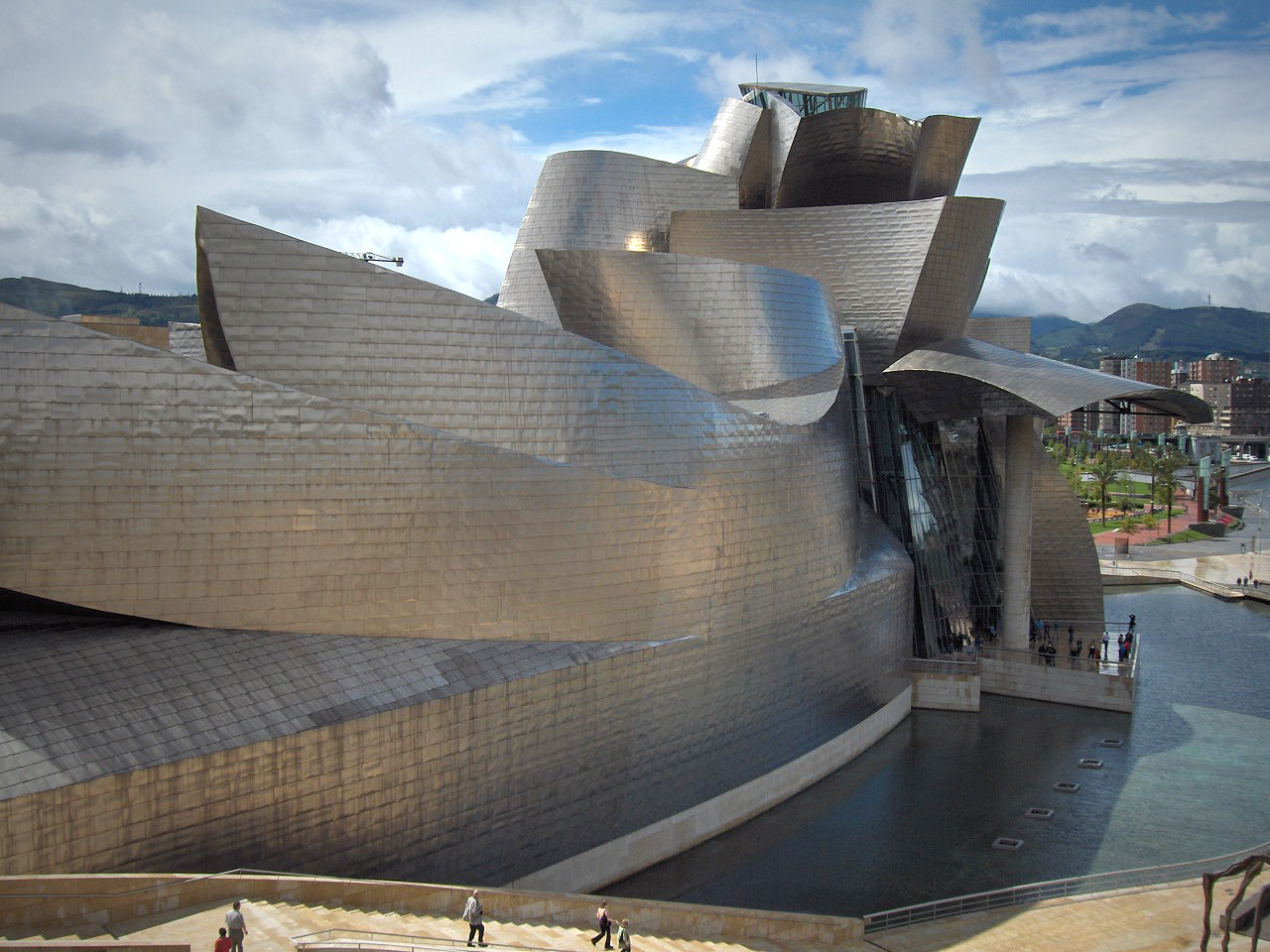 Guggenheim museum in Bilbao, Spain